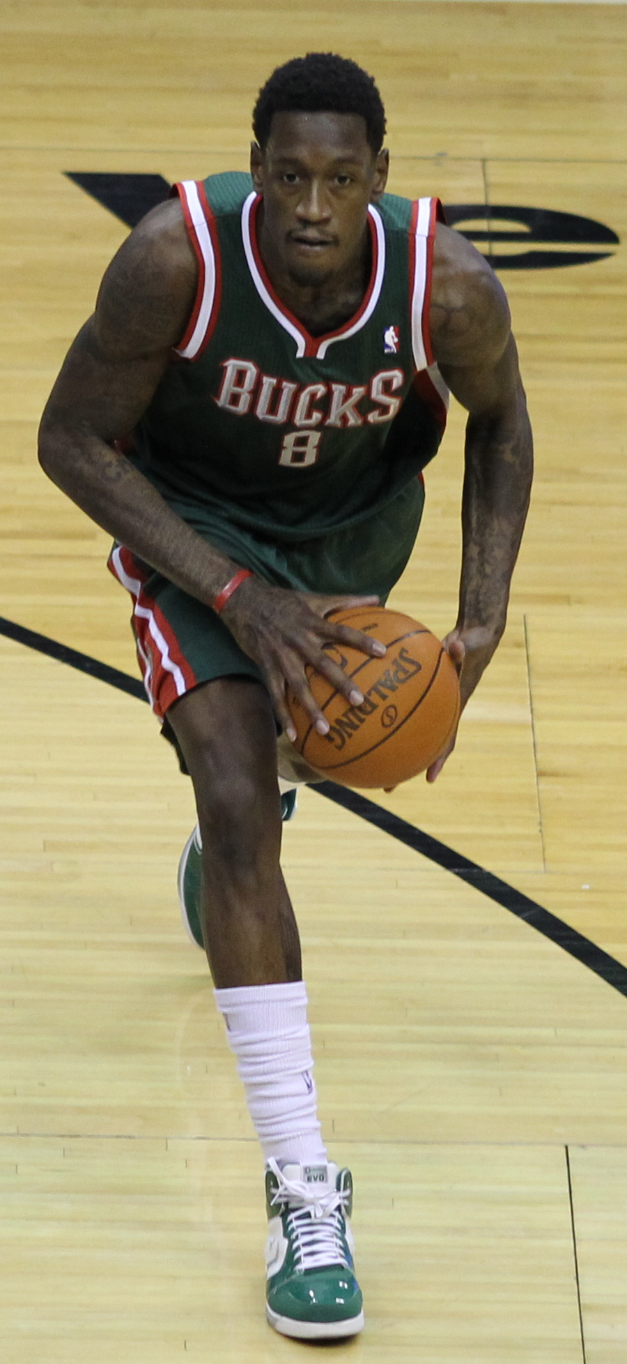 Wizards v/s Bucks 03/08/11